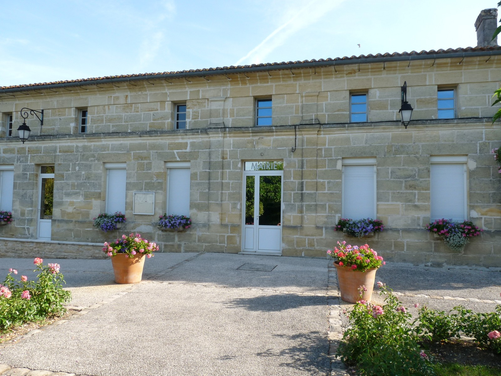 Mairie de St-Sauveur-de-Puynormand, Gironde, France